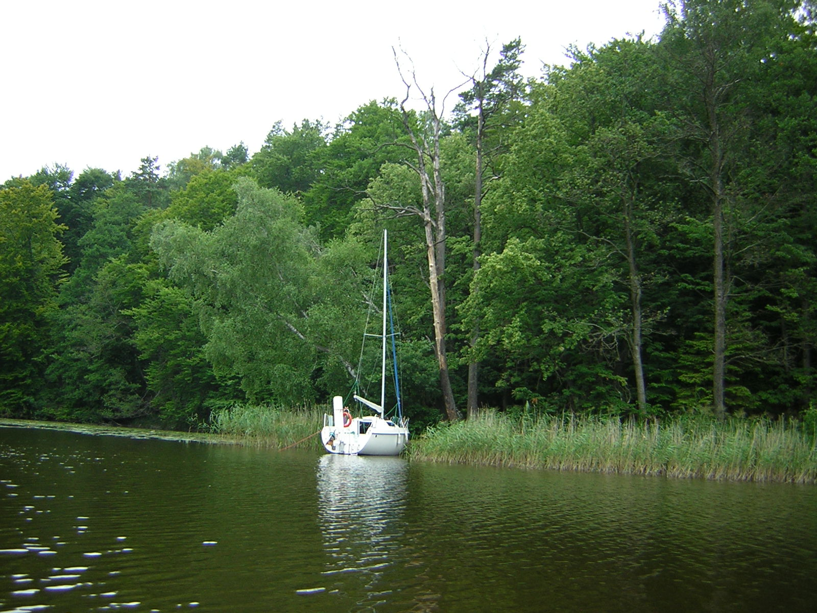 Jezioro Jeziorak w Jażdżówkach